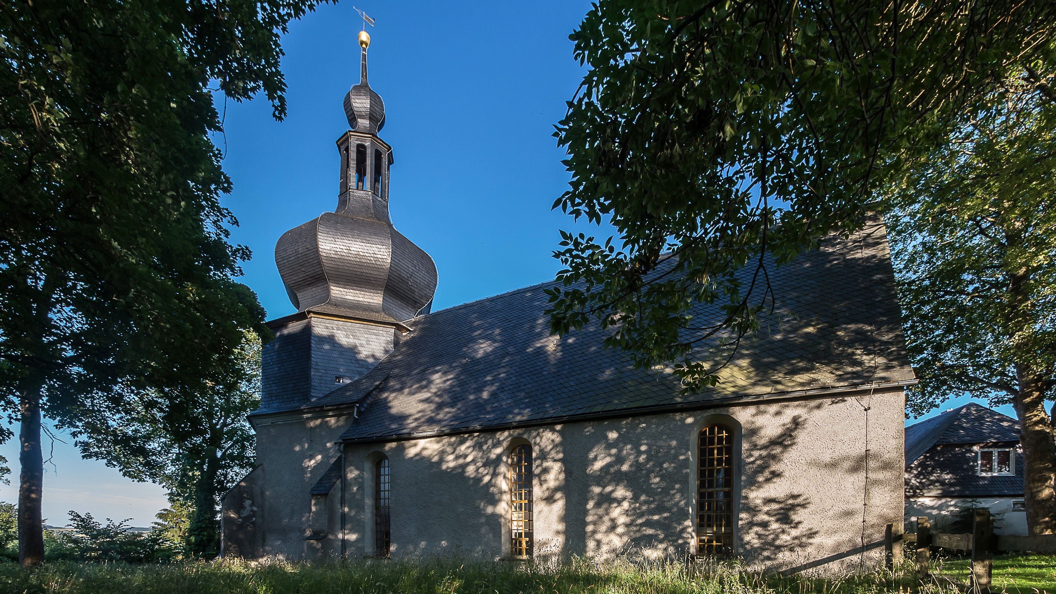 Lichtentanne Nr. 3 Kirche mit Ausstattung Bestandteil Denkmalensemble „Ortslage Lichtentanne“